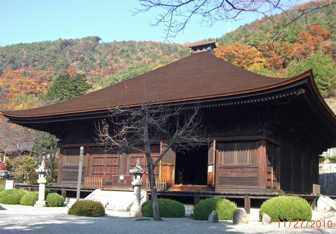 大善寺本堂